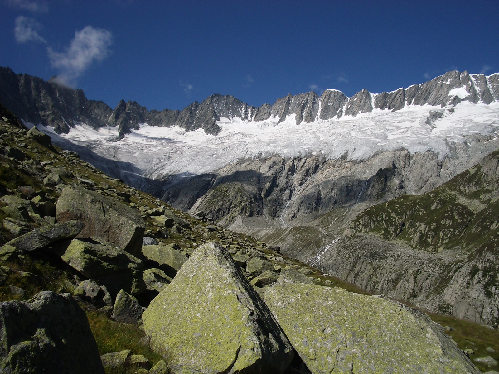 Dammagletscher, Switzerland